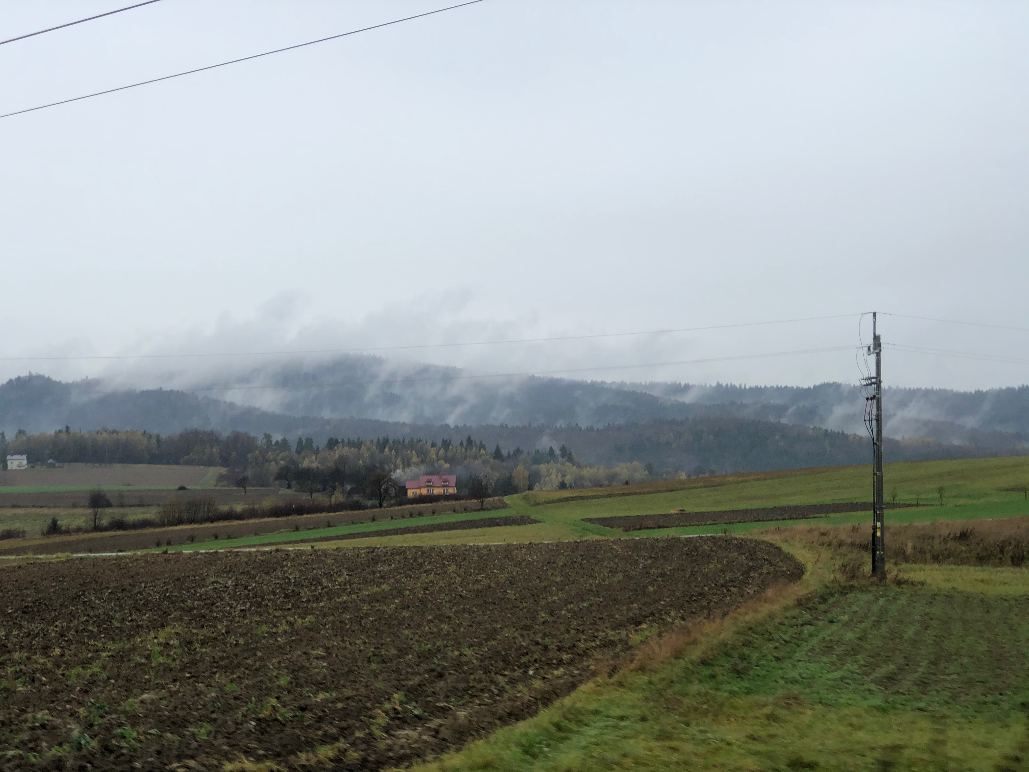 Сколышин